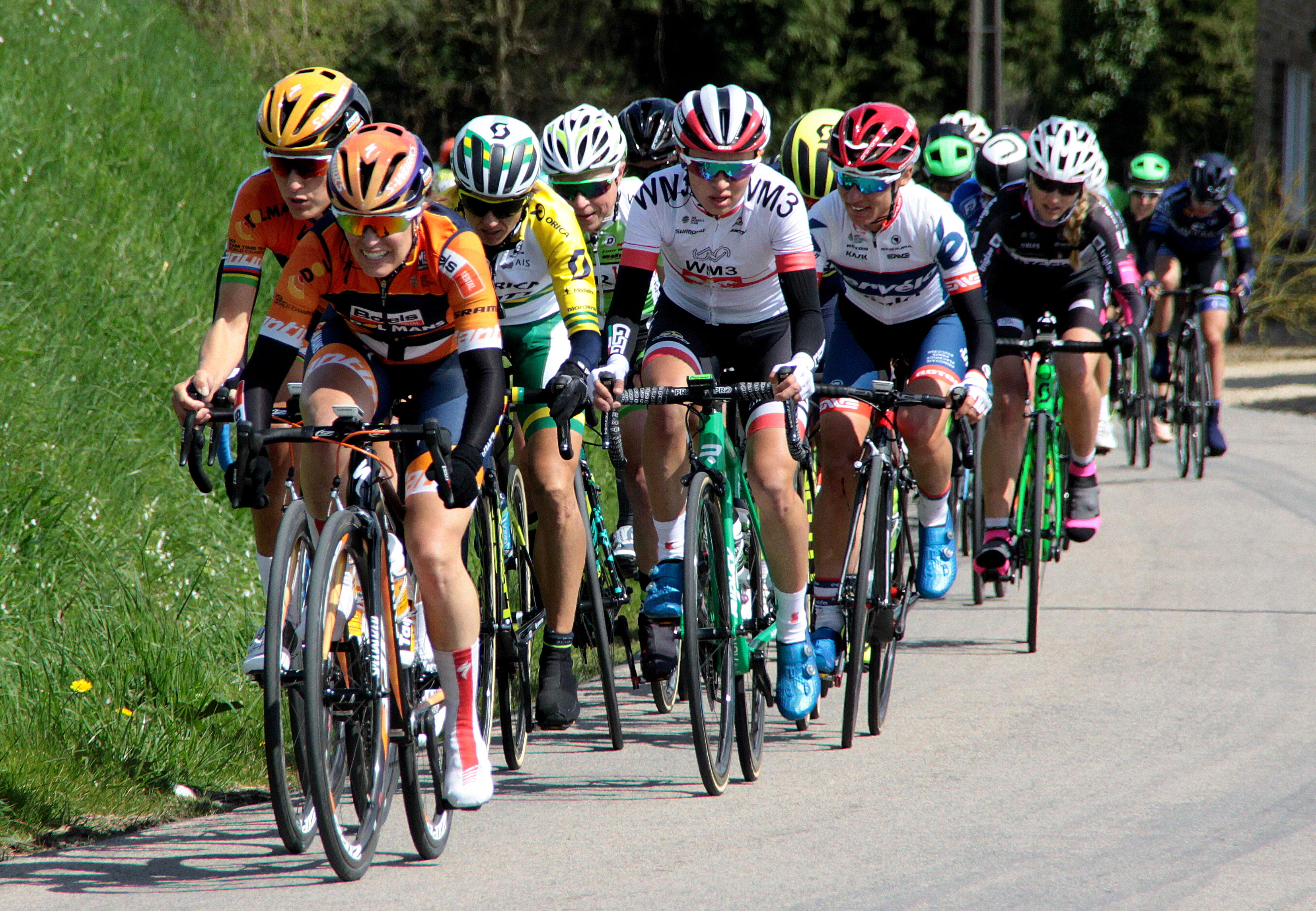 Flèche wallonne féminine 2017, de Plotto an de Côte d'Ereffe. Un der Spëtz d'Kanadierin Karol-Ann Canuel an d'Britin Elizabeth Deignan